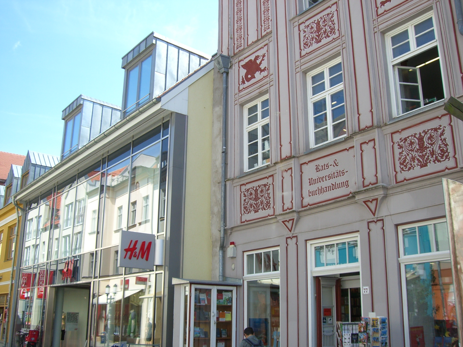 Greifswald